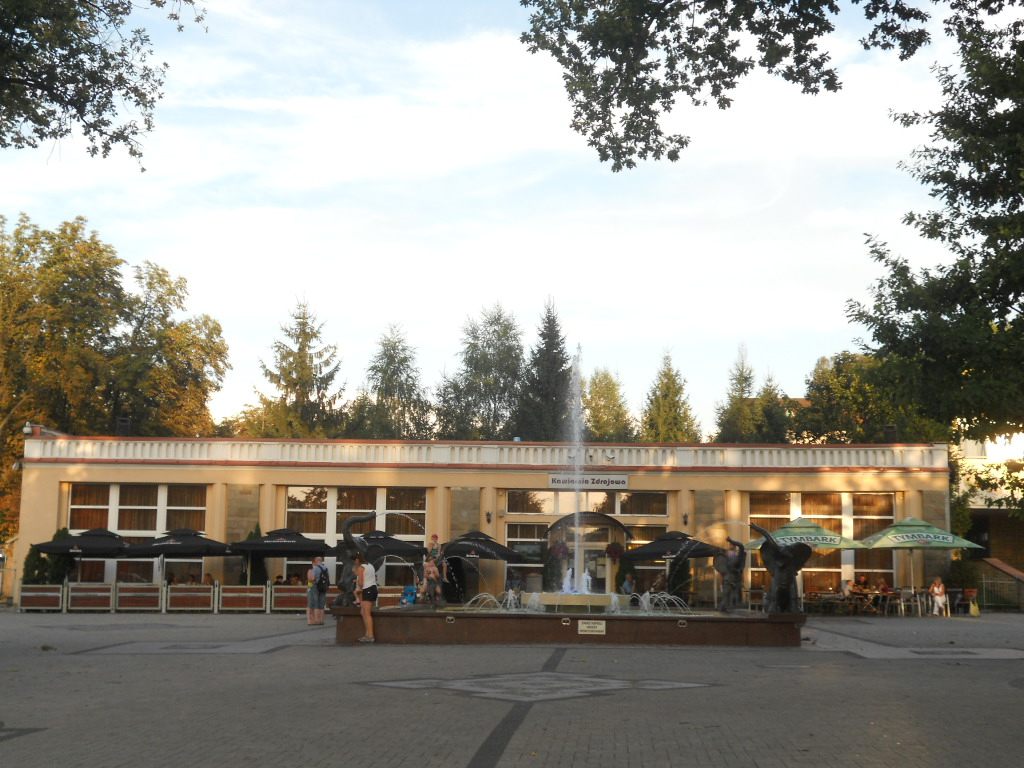 Kawiarnia Zdrojowa i Fontanna Siedmiu Słoni w Rabce-Zdroju przy ulicy Orkana 51.